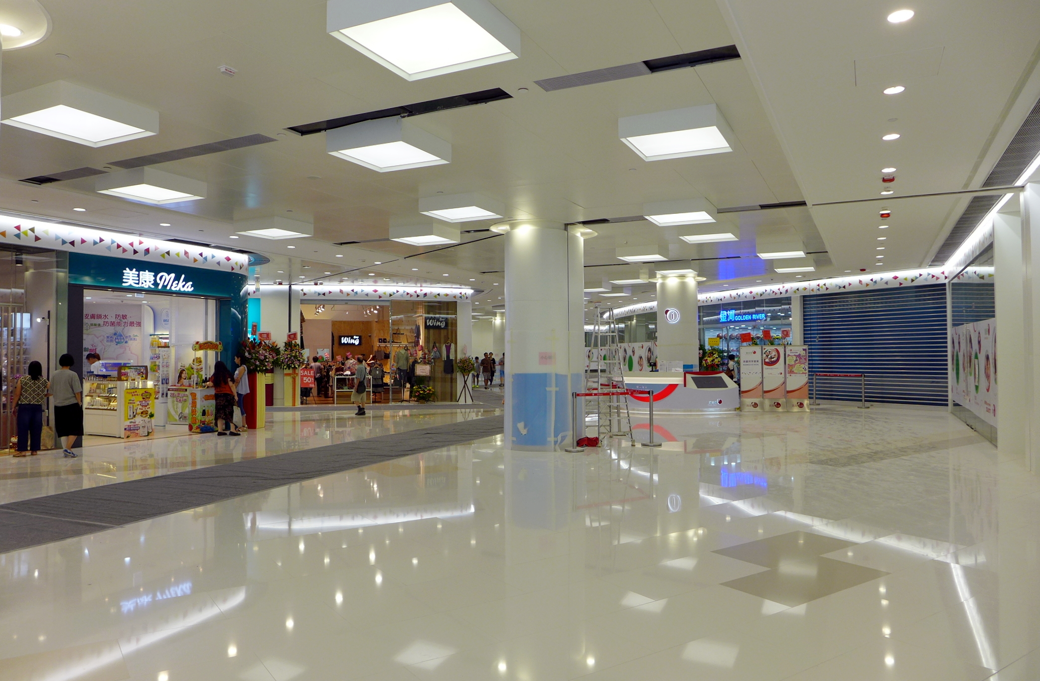 Belvedere Square Interior